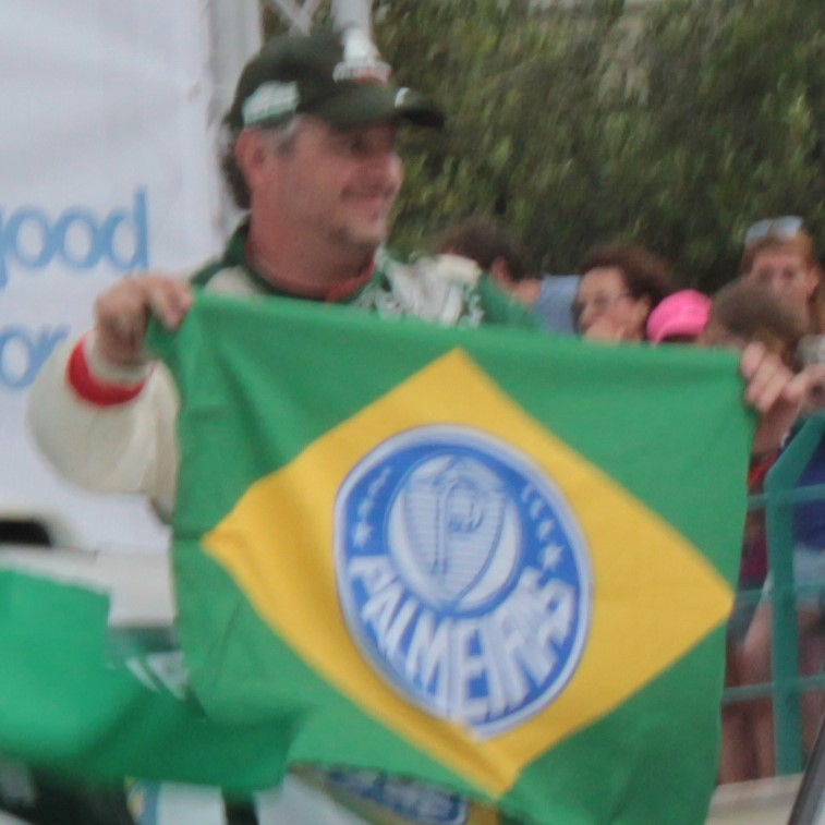 Paulo Nobre podczas Rajdu Akropolis Grecji 2012